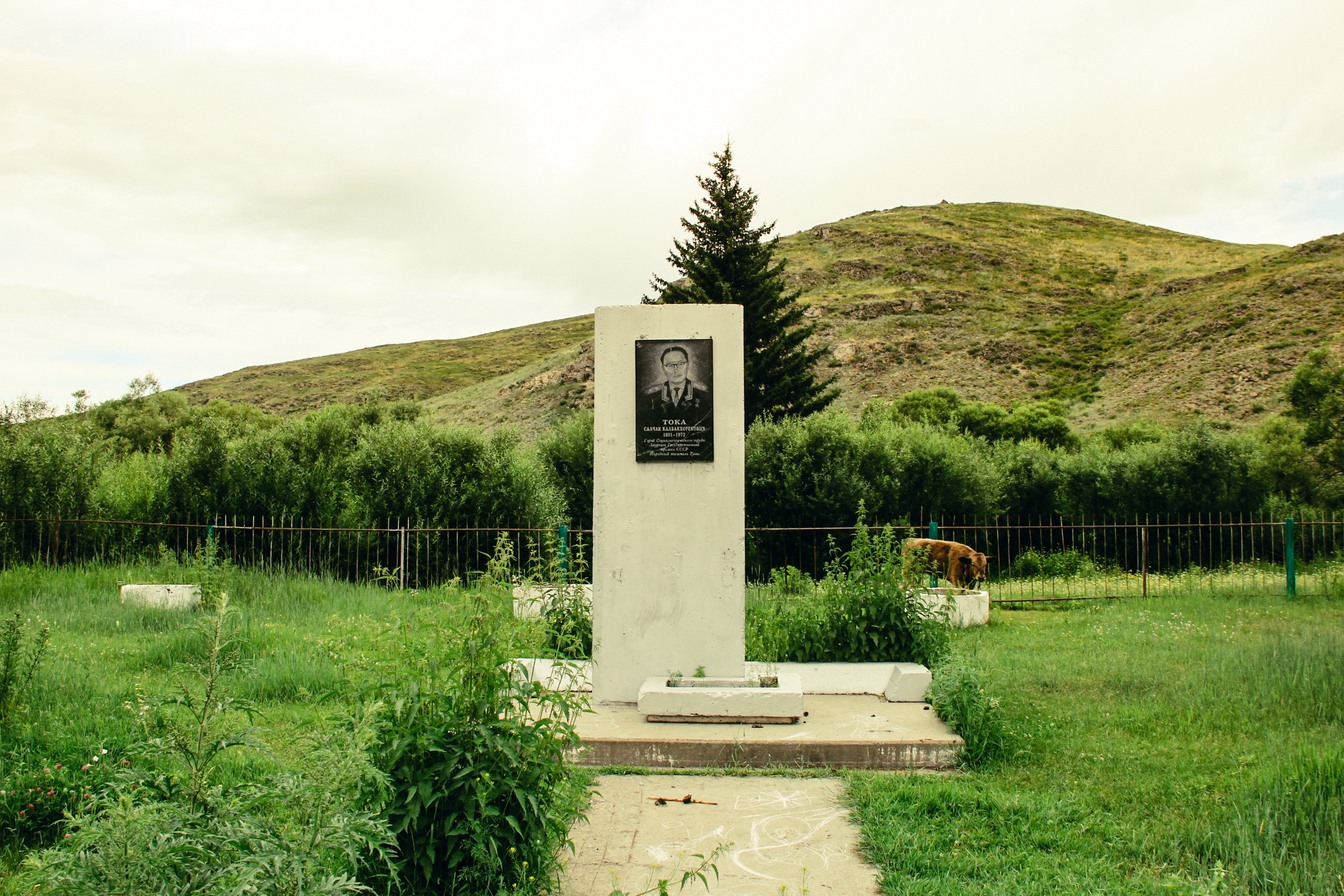 село Мерген Каа-Хемского района РТ